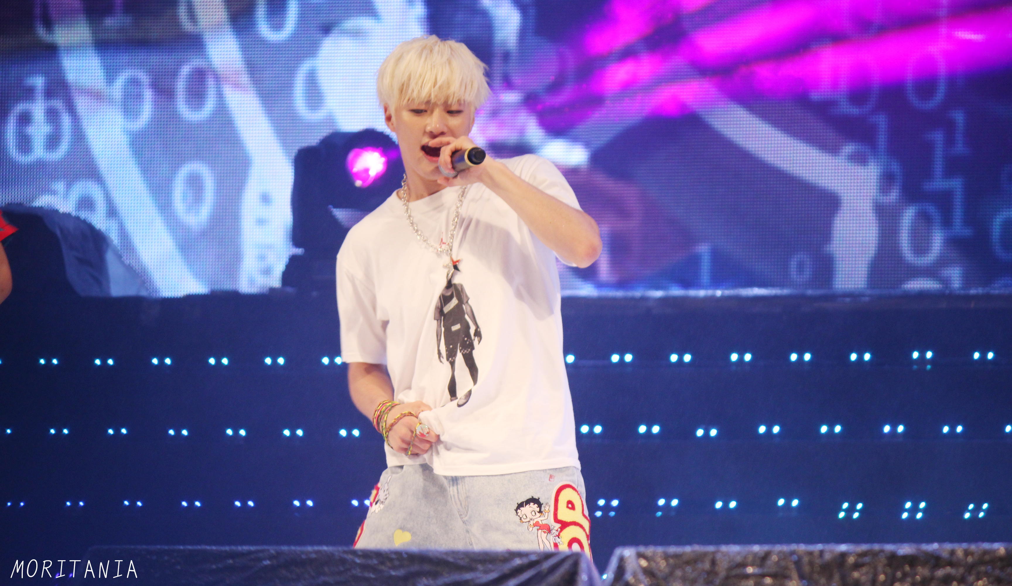 130928 구미 LG 드림페스티벌